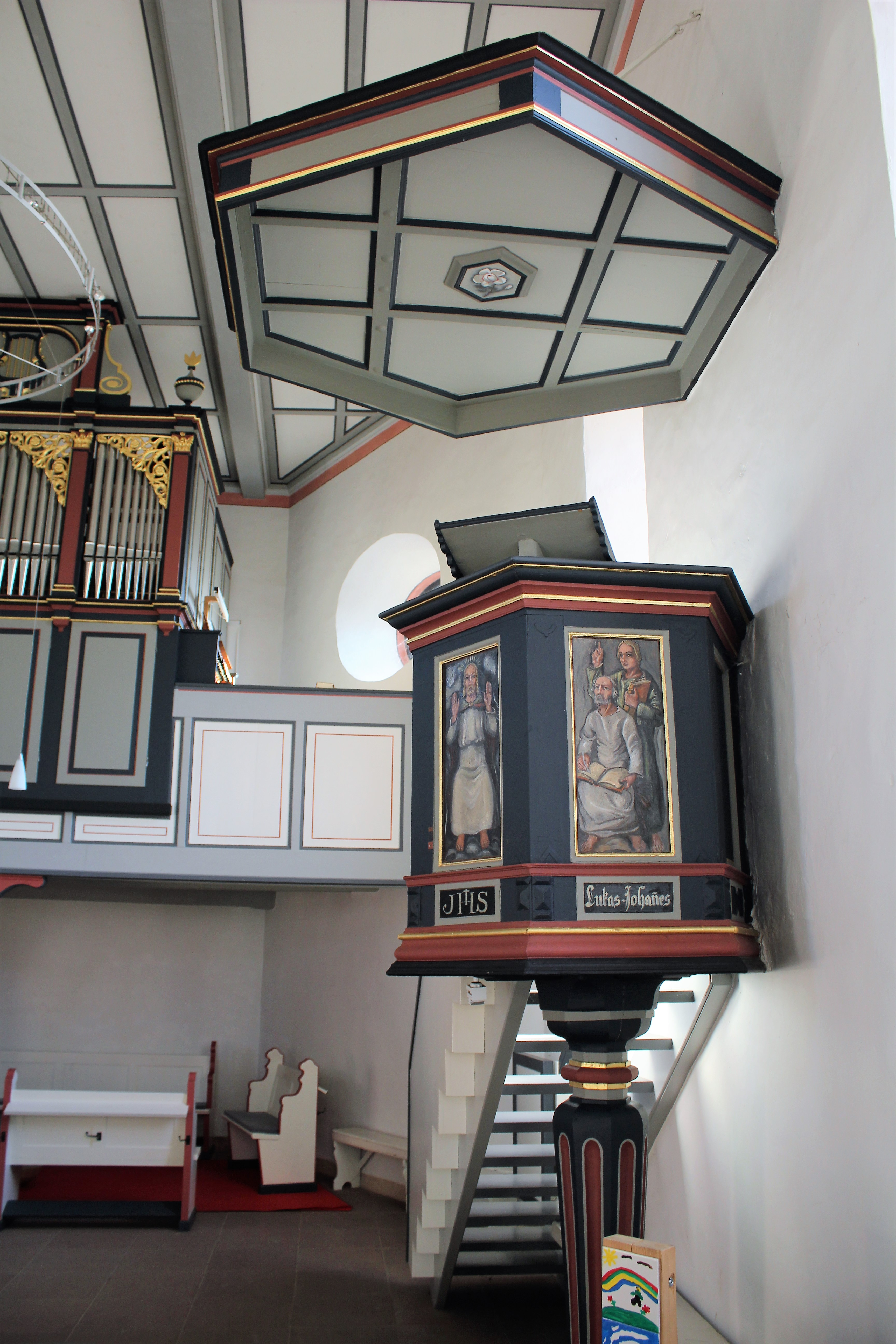 Evangelische Kirche Eichen (Nidderau), Main-Kinzig-Kreis, Hessen, Deutschland